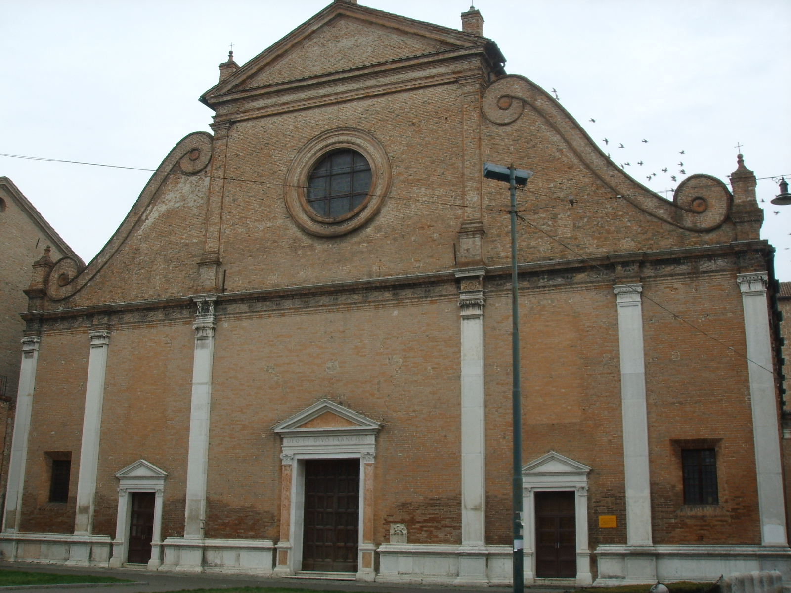 La chiesa di San Francesco a Ferrara.